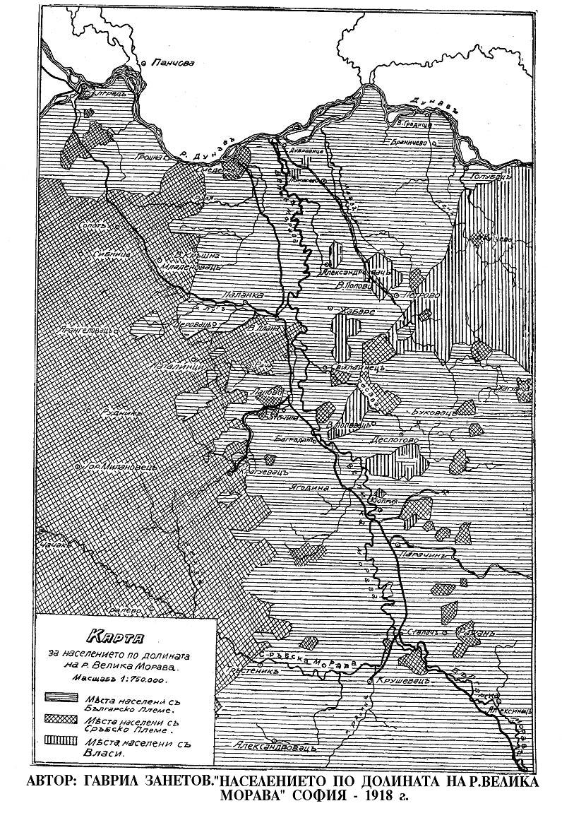 карта на етносите по река Велика Морава